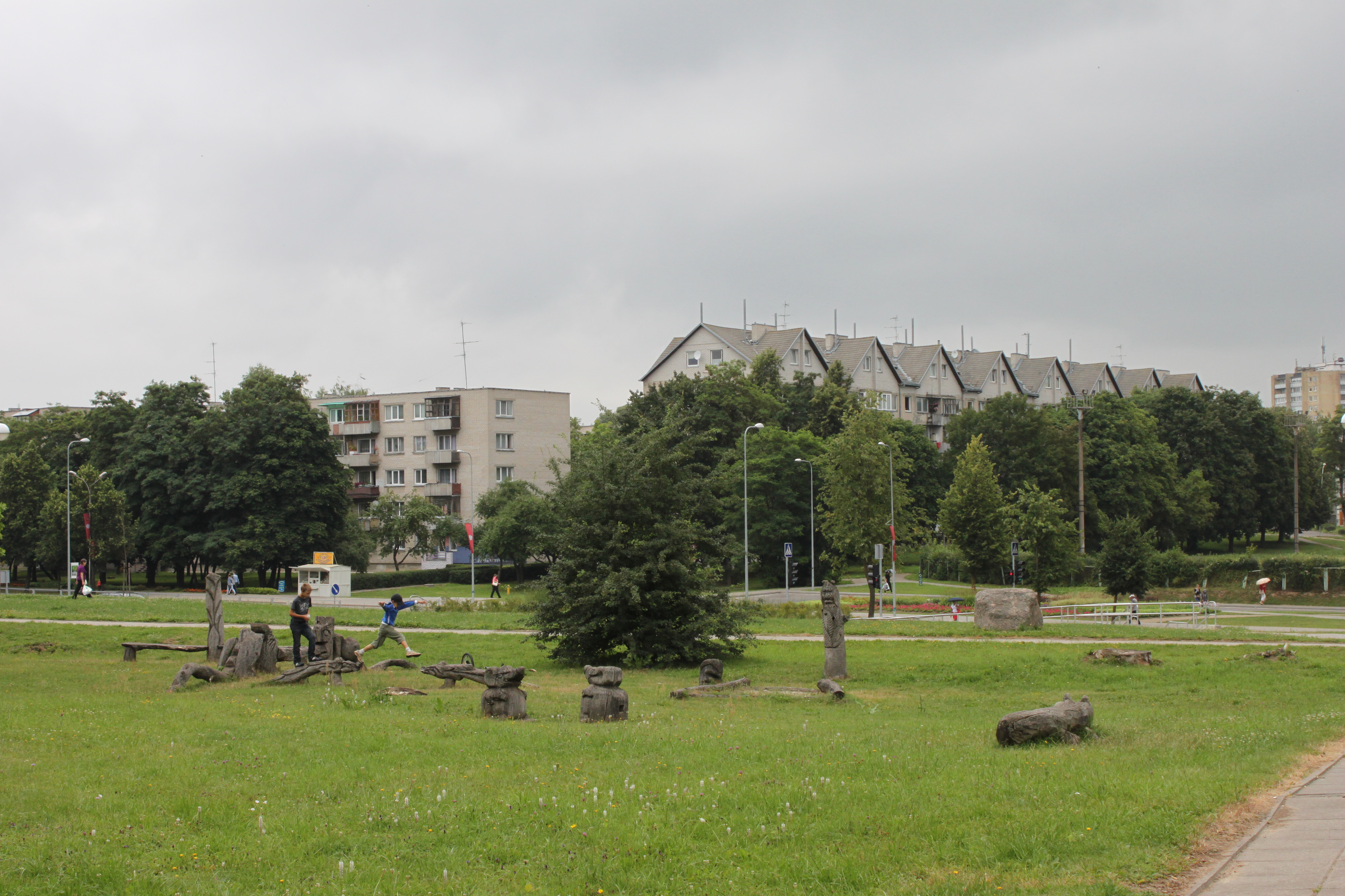 Alytaus Jaunimo parkas